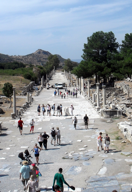 Efez, ulica Portowa - 24 wrzesnia 2011 r.